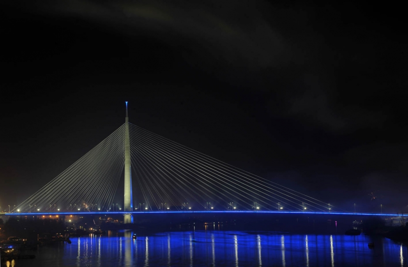 Vatromet Most na Adi